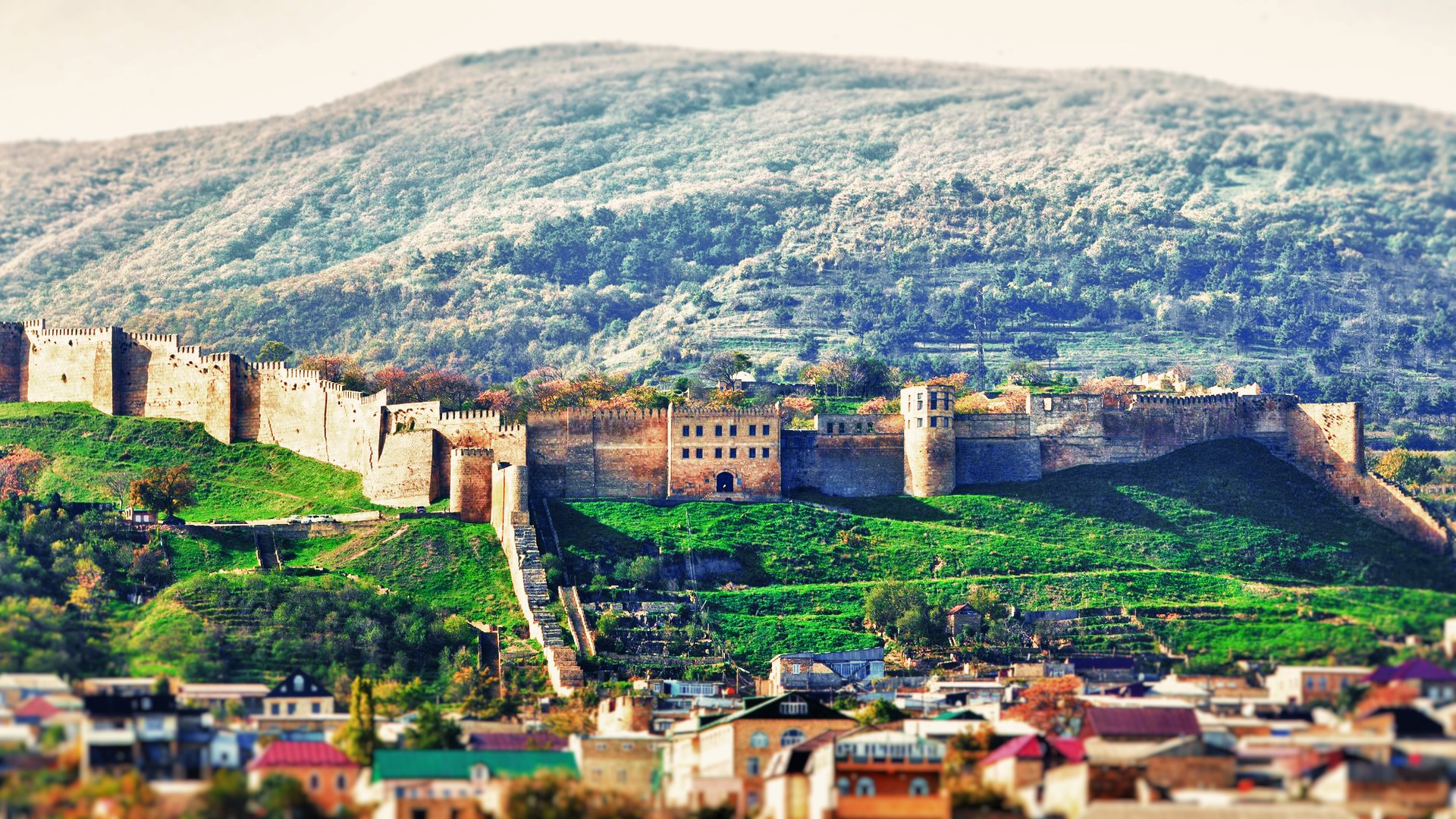 Дербентская цитадель "Нарын-Кала" и древние сооружения внутри цитадели: Дербент, Дагестан